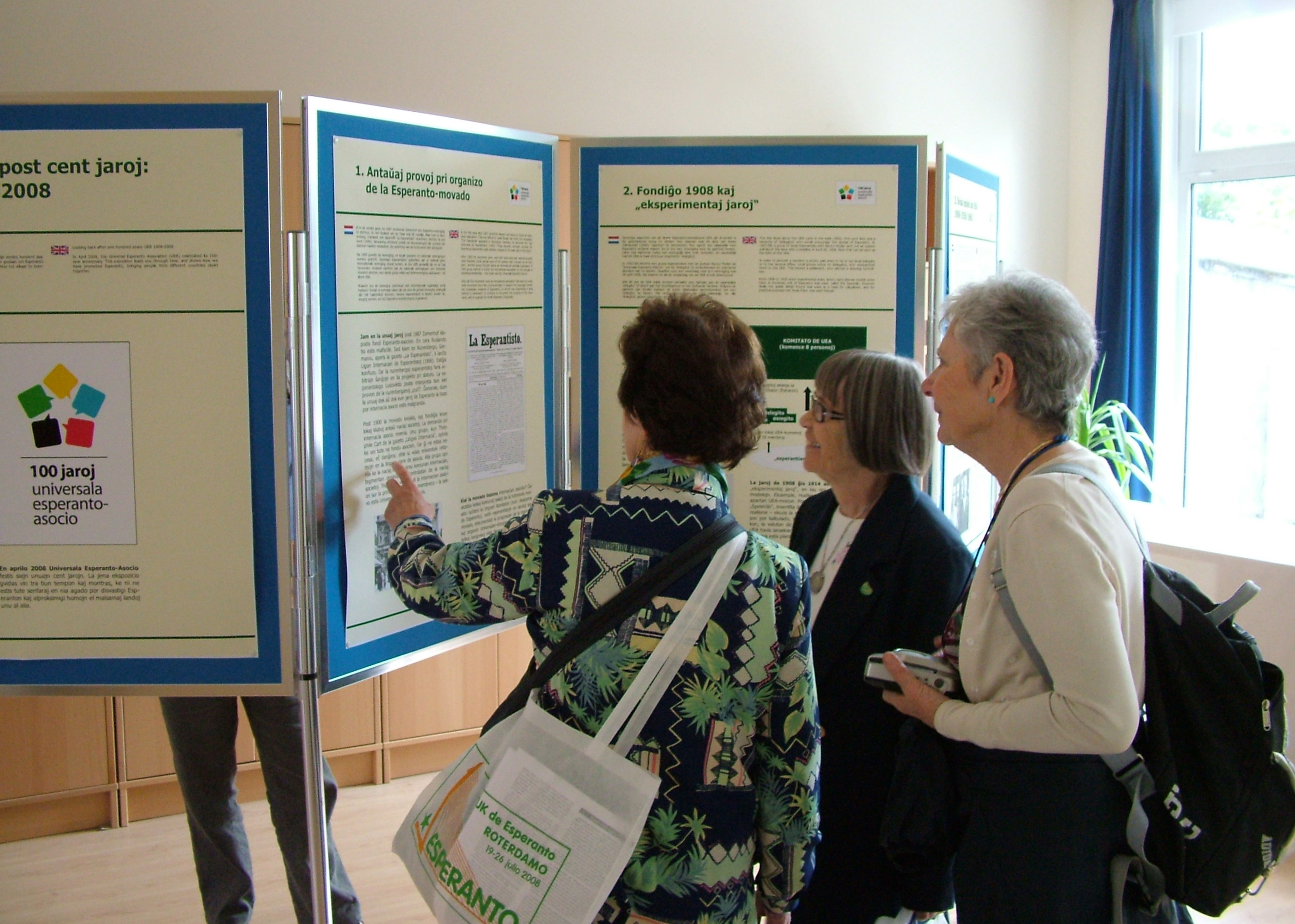 Universala Kongreso de Esperanto, Roterdamo 2008. Ekspozicio en la Centra Oficejo, pri la historio de UEA.